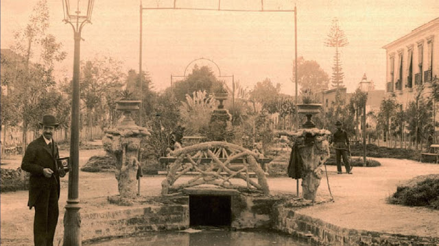 Fotografía de Tacna a fines del siglo XIX o comienzos del siglo XX.